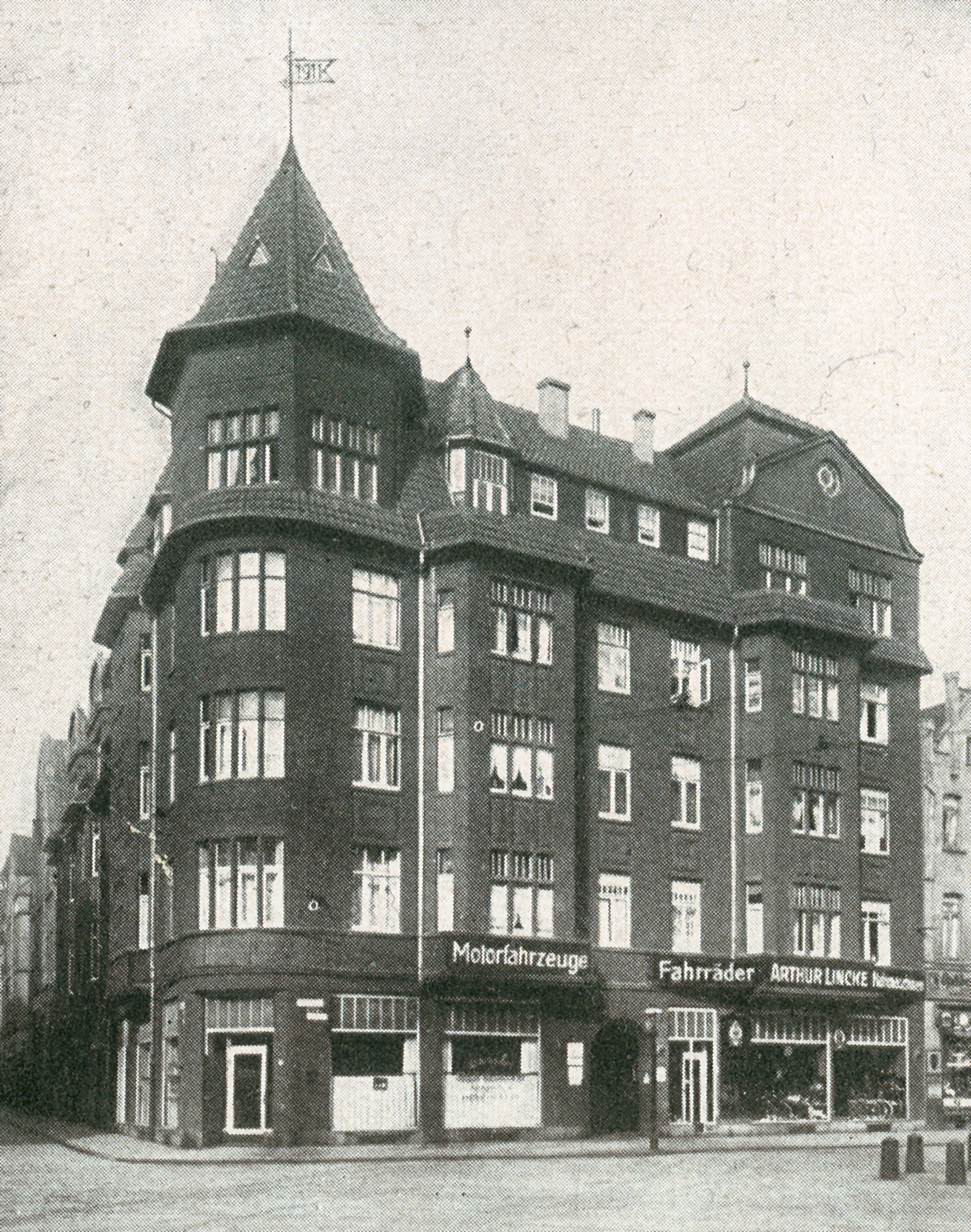 Blick auf den 1911 fertiggestellten Neubau des Fahrräder-, Nähmaschinen- und Motorfahrzeuge- Grosso-Hauses von Arthur Lincke in der Nordstadt von Hannover, Engelbosteler Damm Ecke Oberstraße ...